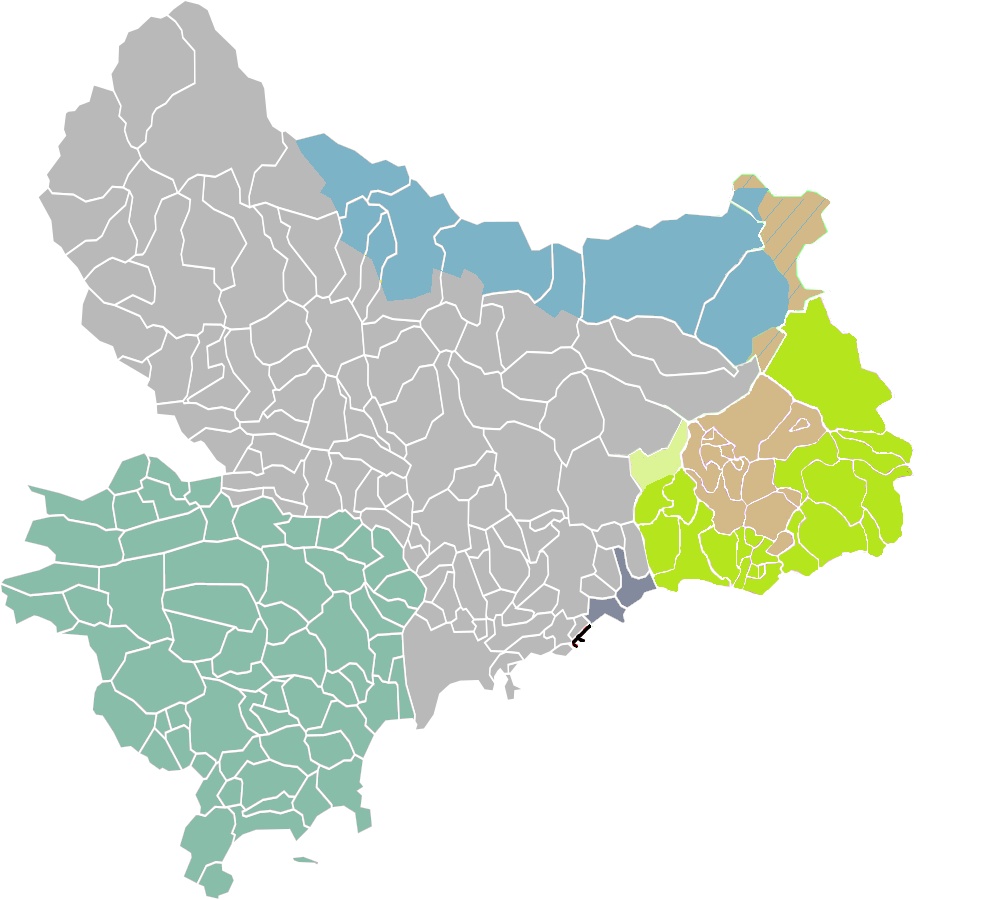 Formation territoriale des Alpes Maritimes depuis 1793